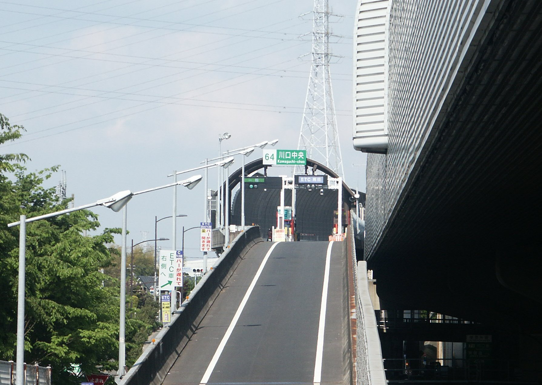 東京外環自動車道川口中央インターチェンジ料金所